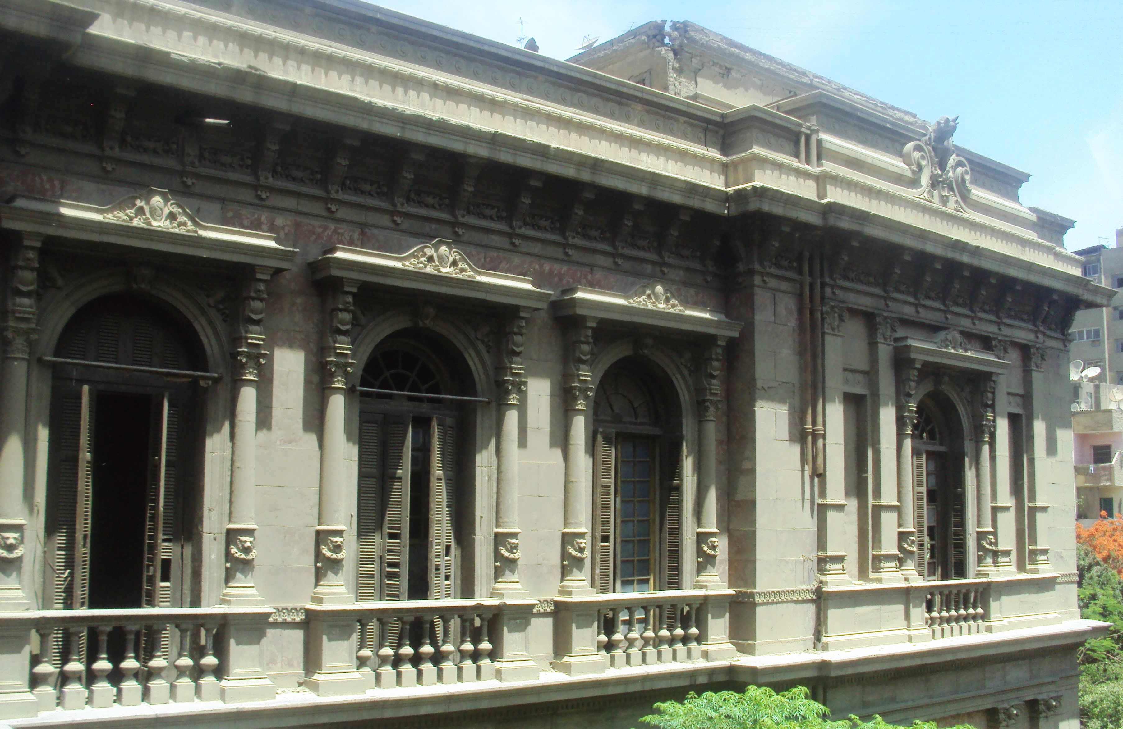 جانب علوي من قصر سعيد باشا حليم Palais Saïd Halim Pacha conçu en 1896 par l'architecte italien Antonio Lasciac